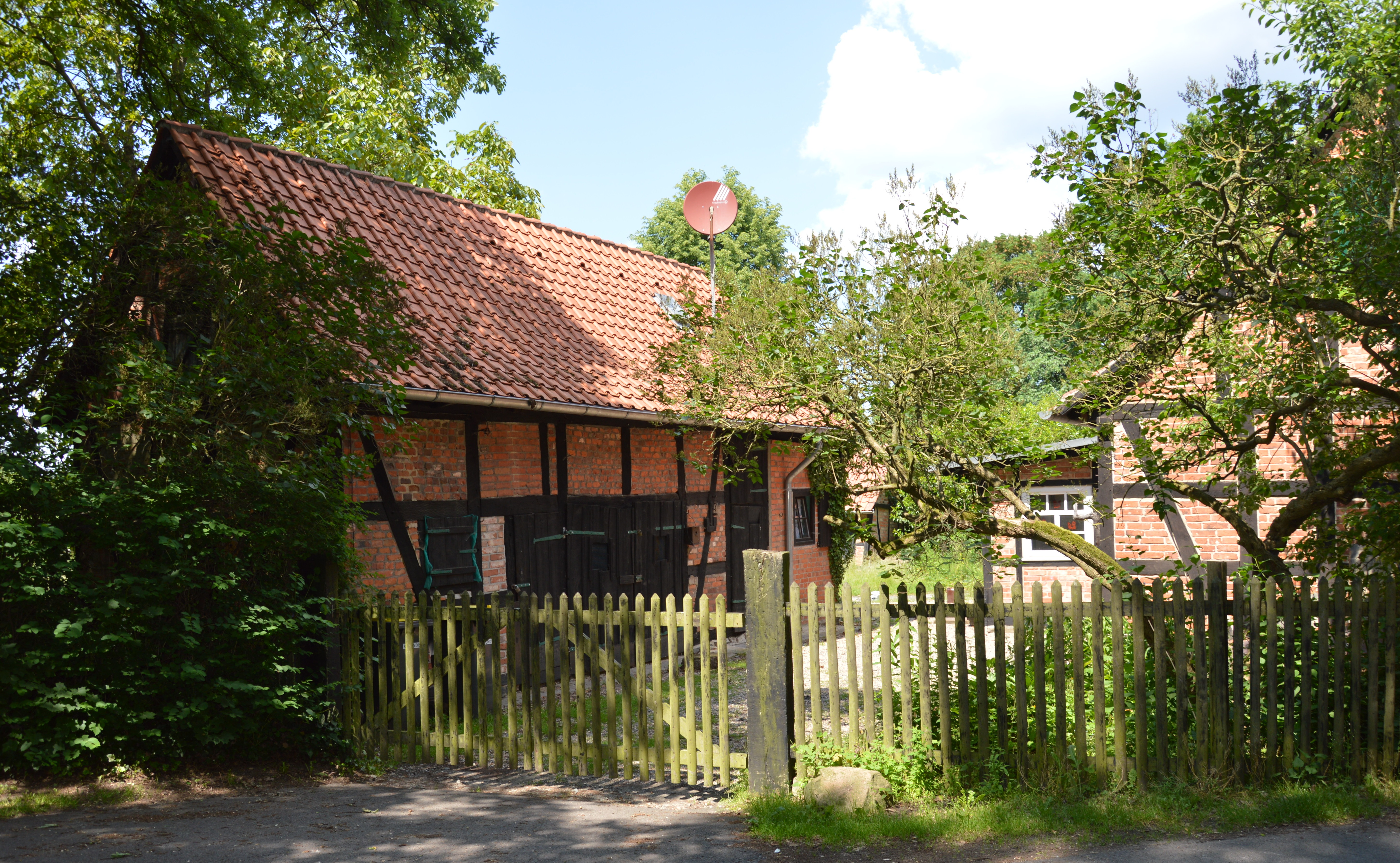 Hof des Jägerhauses Althaldensleben